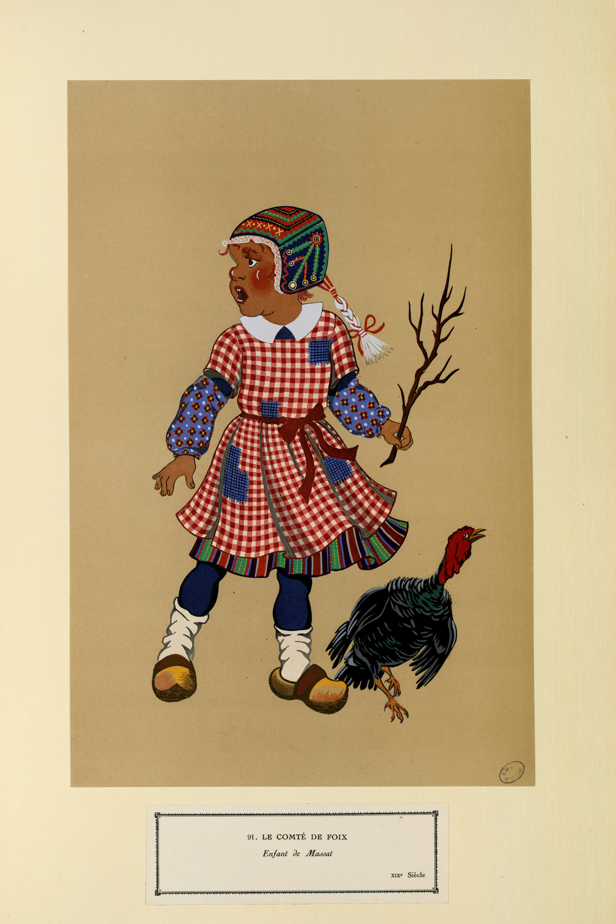 Enfant de Massat en costume traditionnel (XIXe siècle)